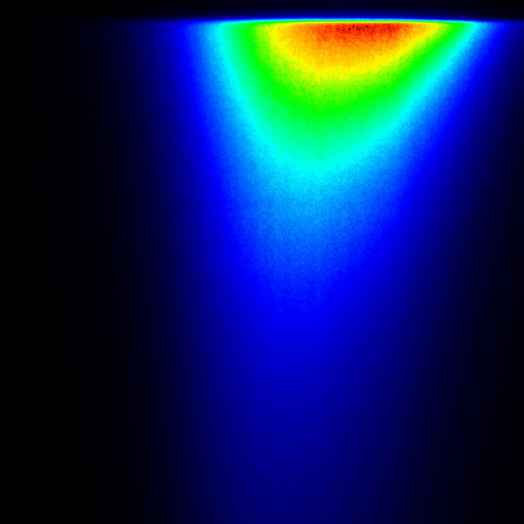 Zu sehen ist das Bild der Photolumineszenz (des abgestrahlten) einer Solarplatte, die mit einem Pulslaser beschossen wurde, aufgenommen mit einer Streakkamera. Auf der horizontalen Achse ist die Wellenlänge, auf der vertikalen die Zeit (von oben nach unten) aufgetragen. Je heller die Farbe, desto stärker die Abstrahlung. Man kann besonders gut den exponentiellen Abfall der Intensität in der Zeitrichtung sehen, da immer weniger Elektronen zur Rekombination in den tieferen Energiezustand zur Verfügung stehen. Der Zeitbereich den das Bild abdeckt ist in der Größenordnung von 10-12 sec.!